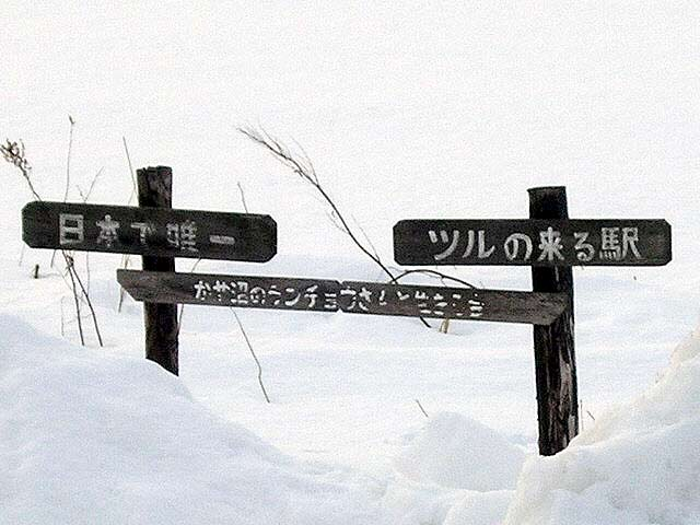 丹頂鶴がくる事を書いている。 撮影場所 茅沼駅ホームより 撮影者によるGFDLリリース